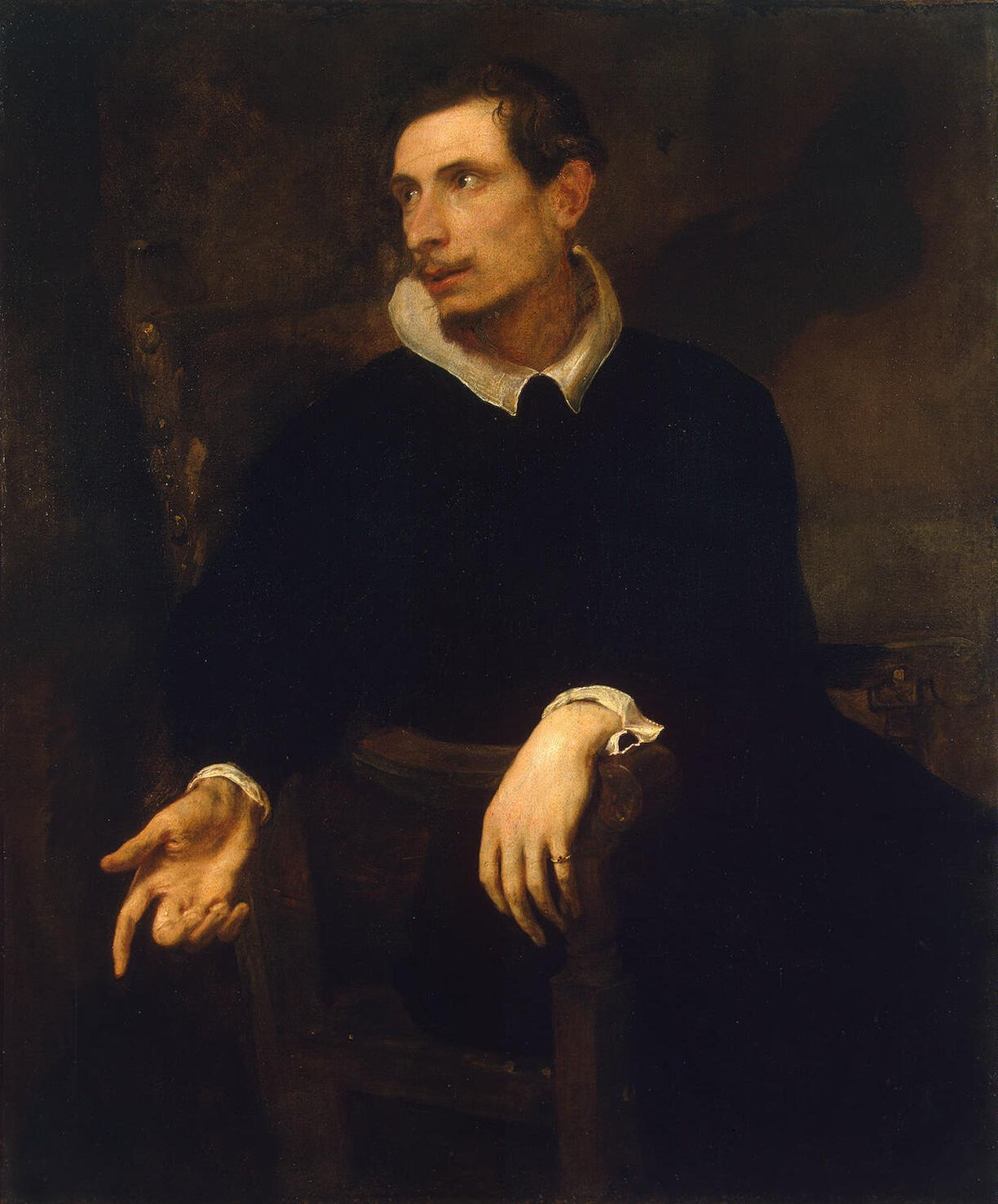 Ritratto di Virginio Cesarini, olio su tela, Ermitage, San Pietroburgo